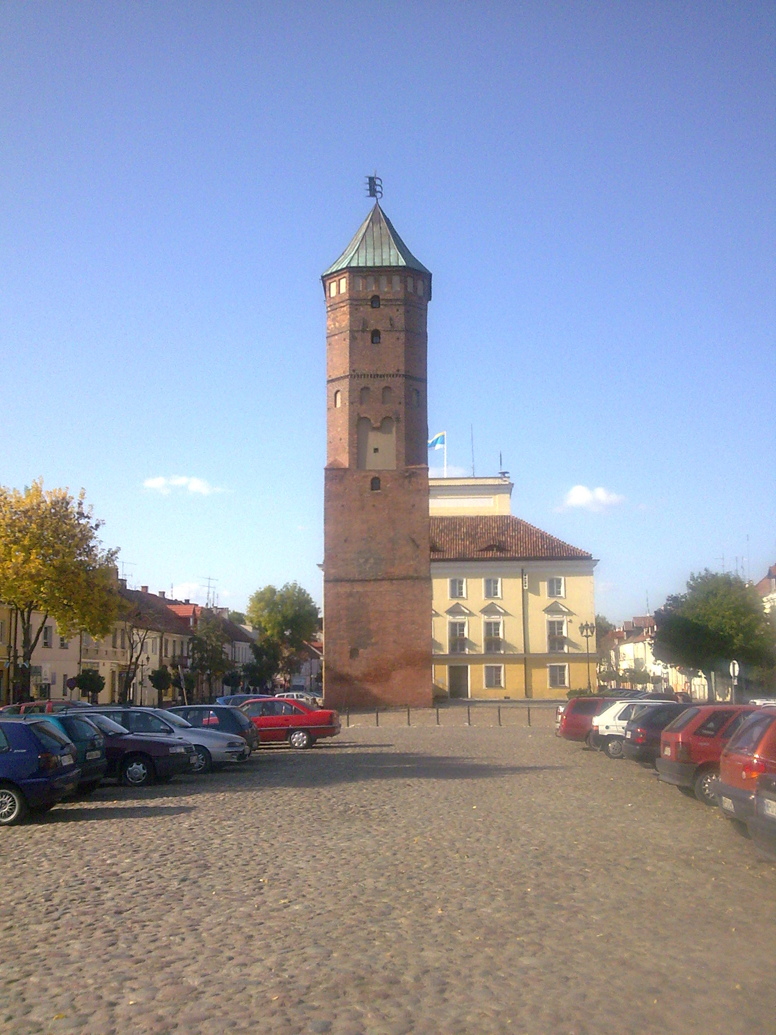 na najdłuższym rynku w Europie